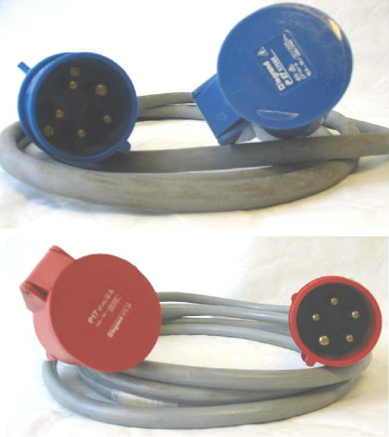 Door mezelf gemaakte foto's. De getoonde merken zijn onleesbaar.